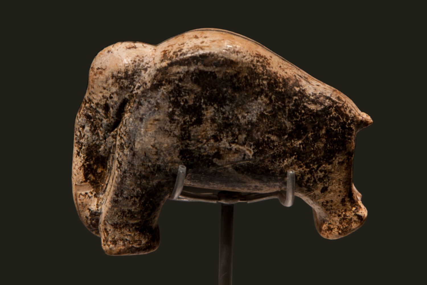 Vogelherdhöhle: Figur eines Mammuts aus Mammutelfenbein, Fund 2006 im Abraum der Grabung Gustav Rieks von 1931. Aurignacien, Länge 37 mm, Höhe 27 mm, Tiefe 14 mm, Gewicht 5,3 g.